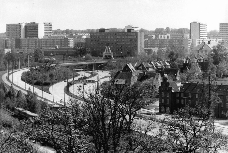 Schwerin, Großer Dreesch ADN-ZB Pätzold-14.5.1987 Schwerin: Städteporträt-Auf dem "Großen Dreesch", Schwerins größten Neubaugebiet, fanden rund 60.000 Bezirksstädter ein schönes zu Hause. Das neue Wohnviertel entstand in unmittelbarer Nähe der Naherholungszentren am Schweriner See. Jeder zweite Schweriner wohnt bereits in einer neugebauten oder sanierten Wohnung.